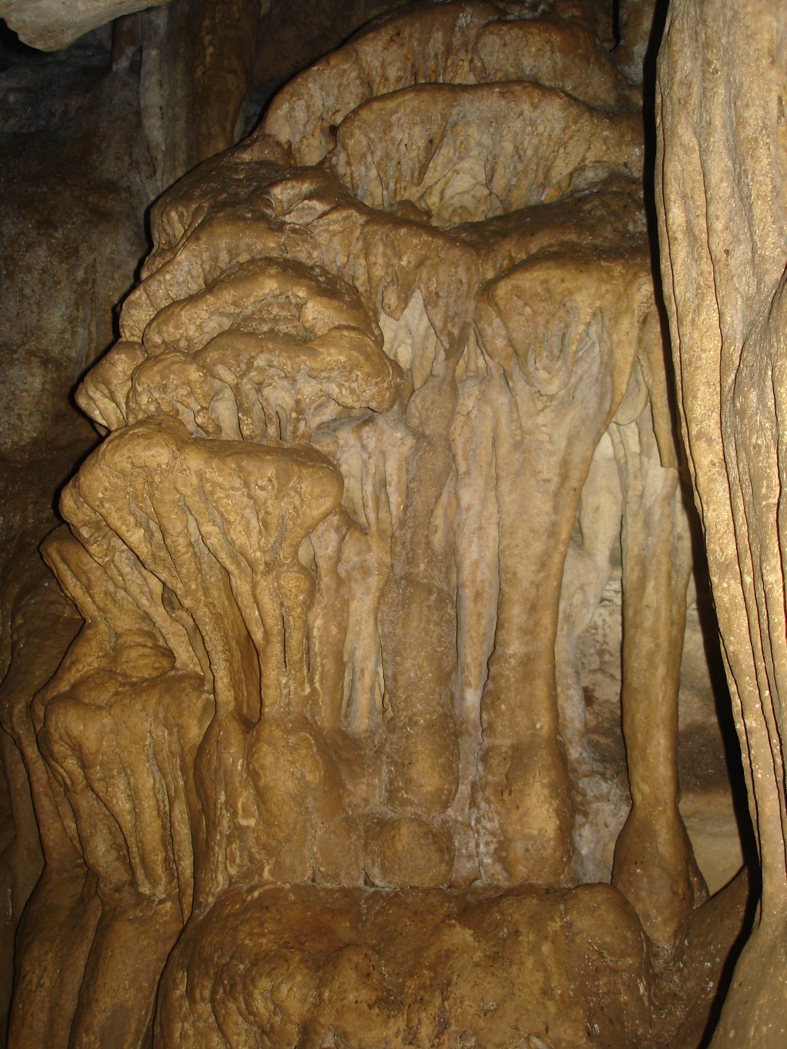 Formación rocosa al interior de las cuevas de Jumandi en Archidona, Ecuador.